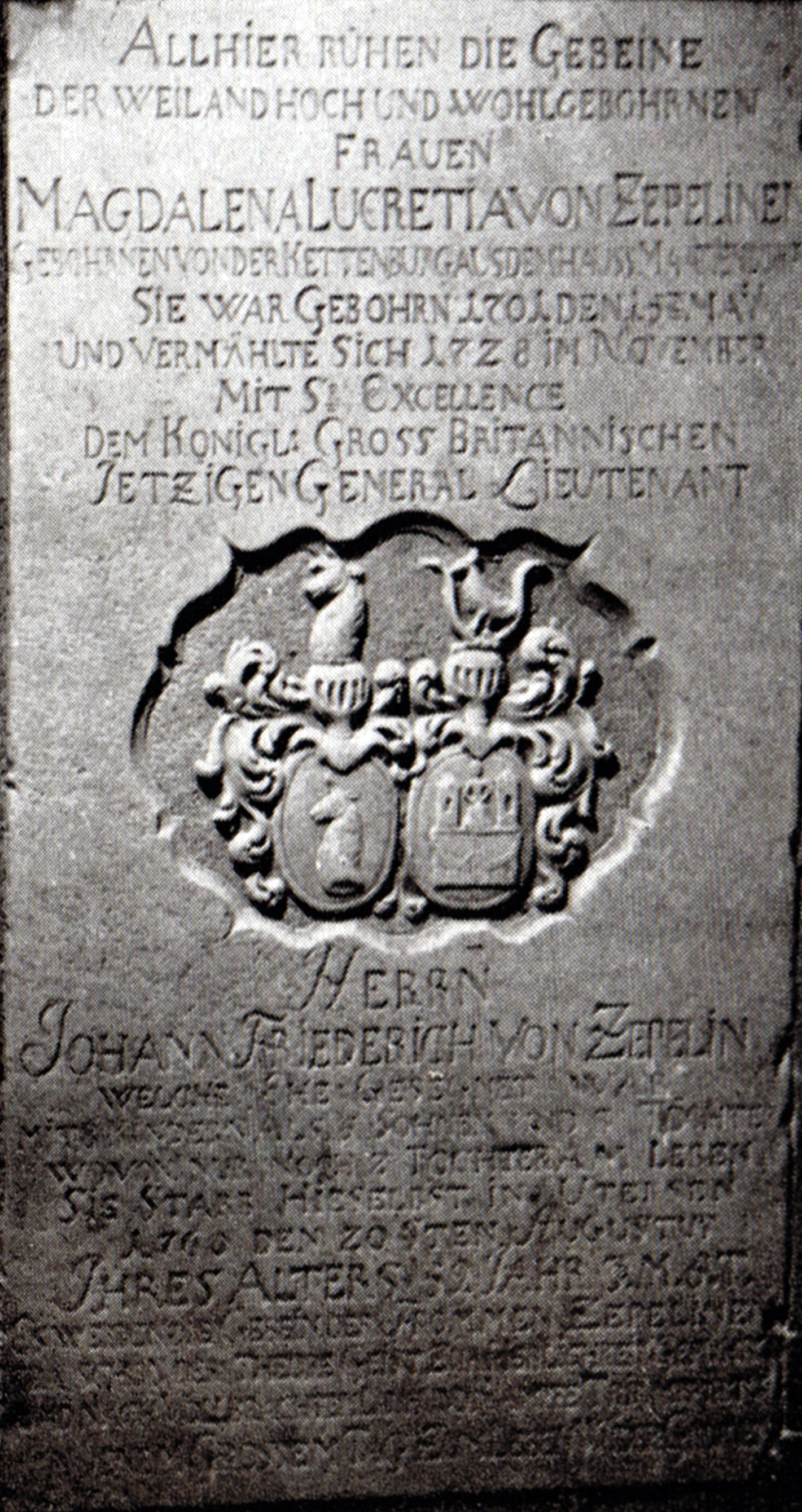 Grabstein Magdalena Lucretia (geb. von der Kettenburg aus dem Hause Matgendorf) von Zepelinen (15. Mai 1701 - 20. August 1760), Ehefrau des Generals Johann Friedrich von Zepelin (Zeppelin) (2. September 1695 - 28. April 1777)